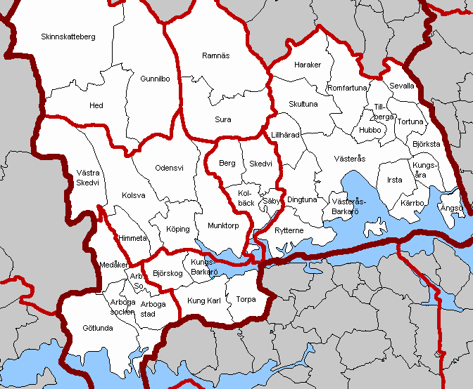 old municipalities of Västerås, Hallstahammar, Surahammar, Skinnskatteberg, Köping, Arboga and Kungsör.